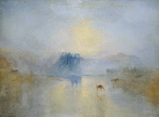 Вильям Тернер (ок. 1841)